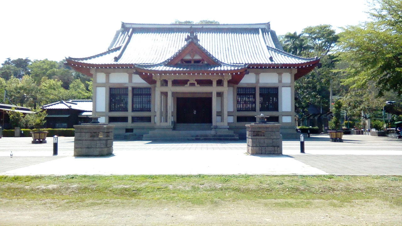 位於旗山國小旁 鼓山公園前